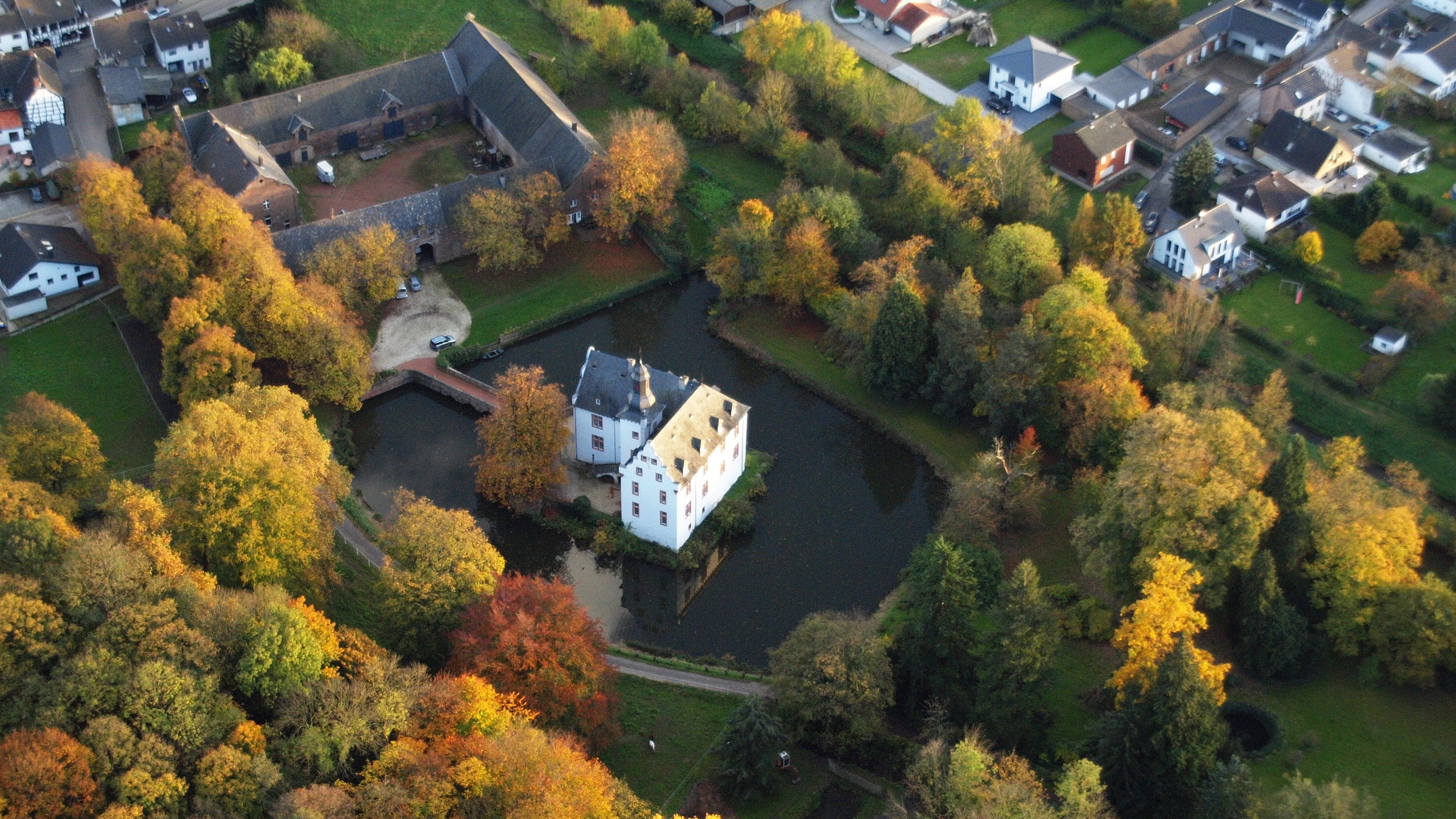 Burg Metternich